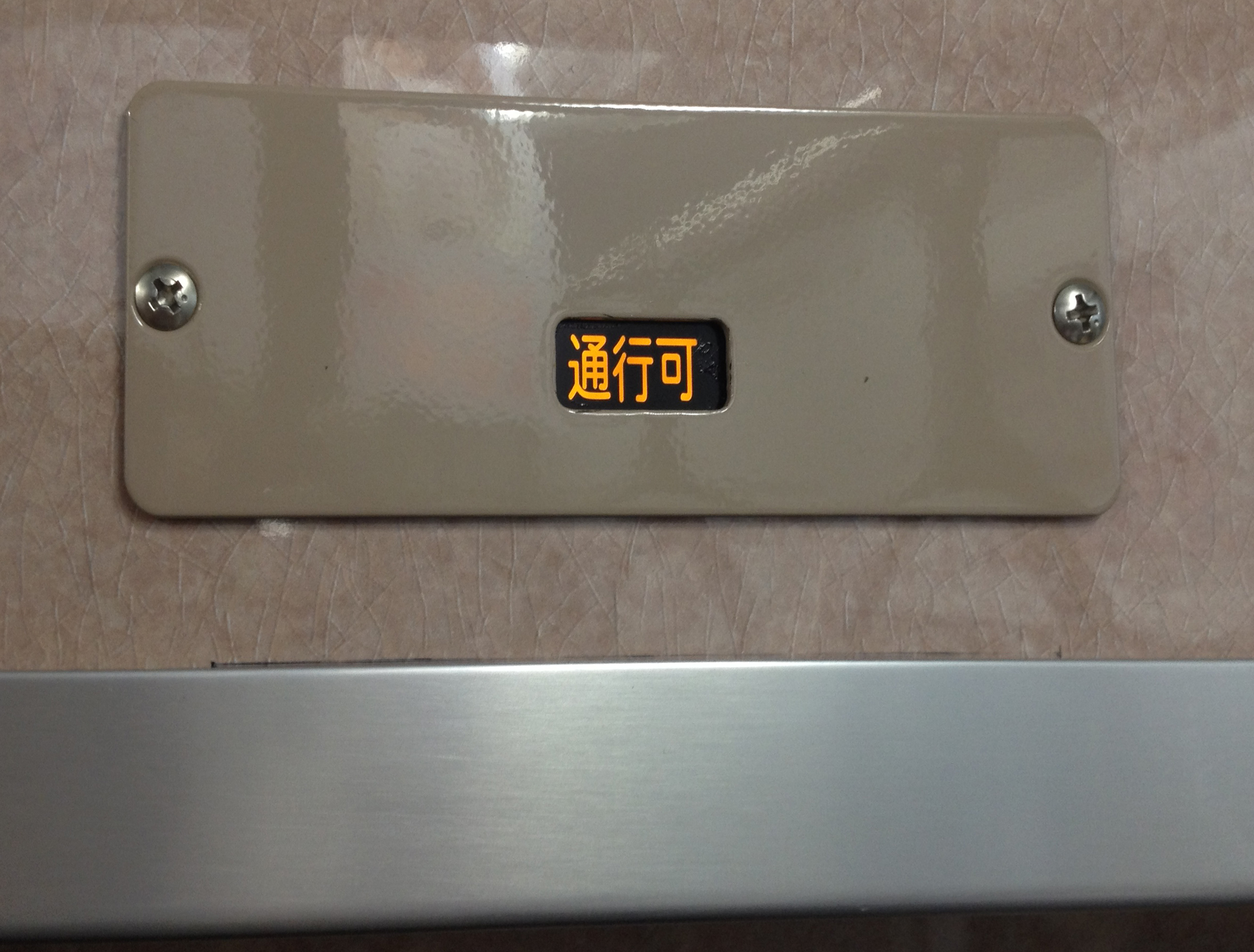 東急5050系4000番台車両の通行表示灯。 たまたま点灯していたものを投稿者が撮影。